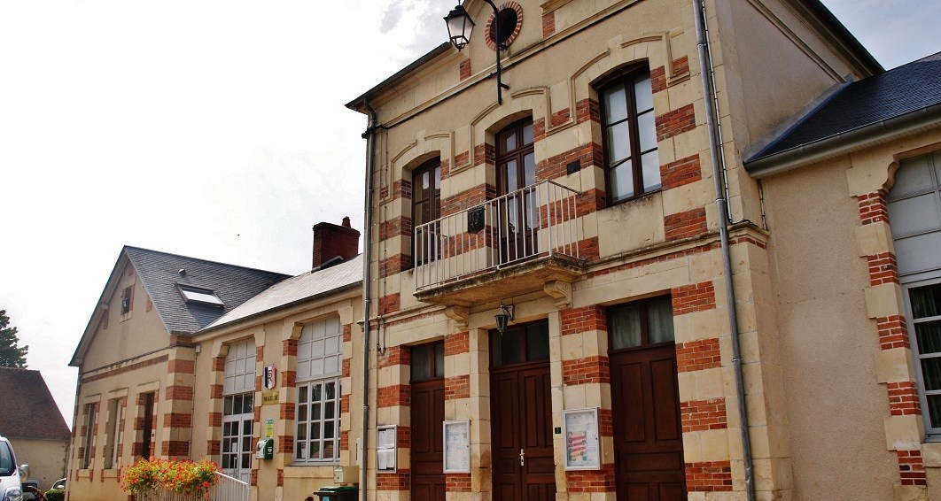 La Mairie